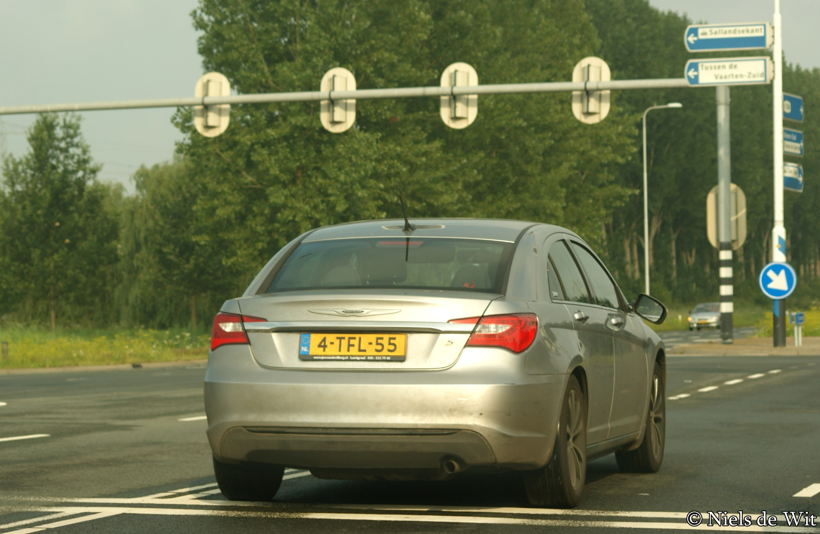 4-TFL-55